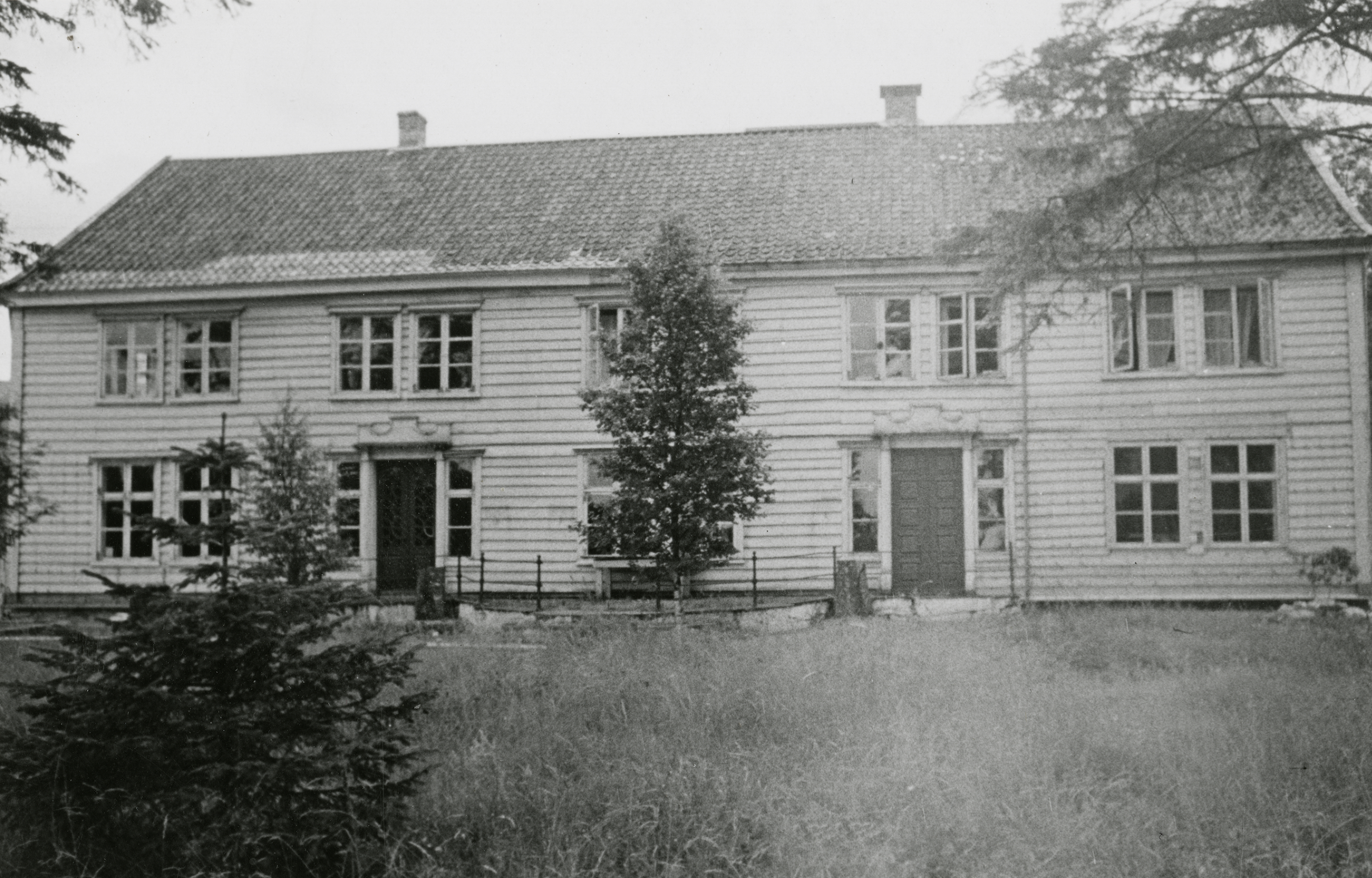 Gjerde, Yris hotell, Boalthgården i Eid, Sogn og Fjordane This image on crowdsourcing geotagging platform Fotodugnad